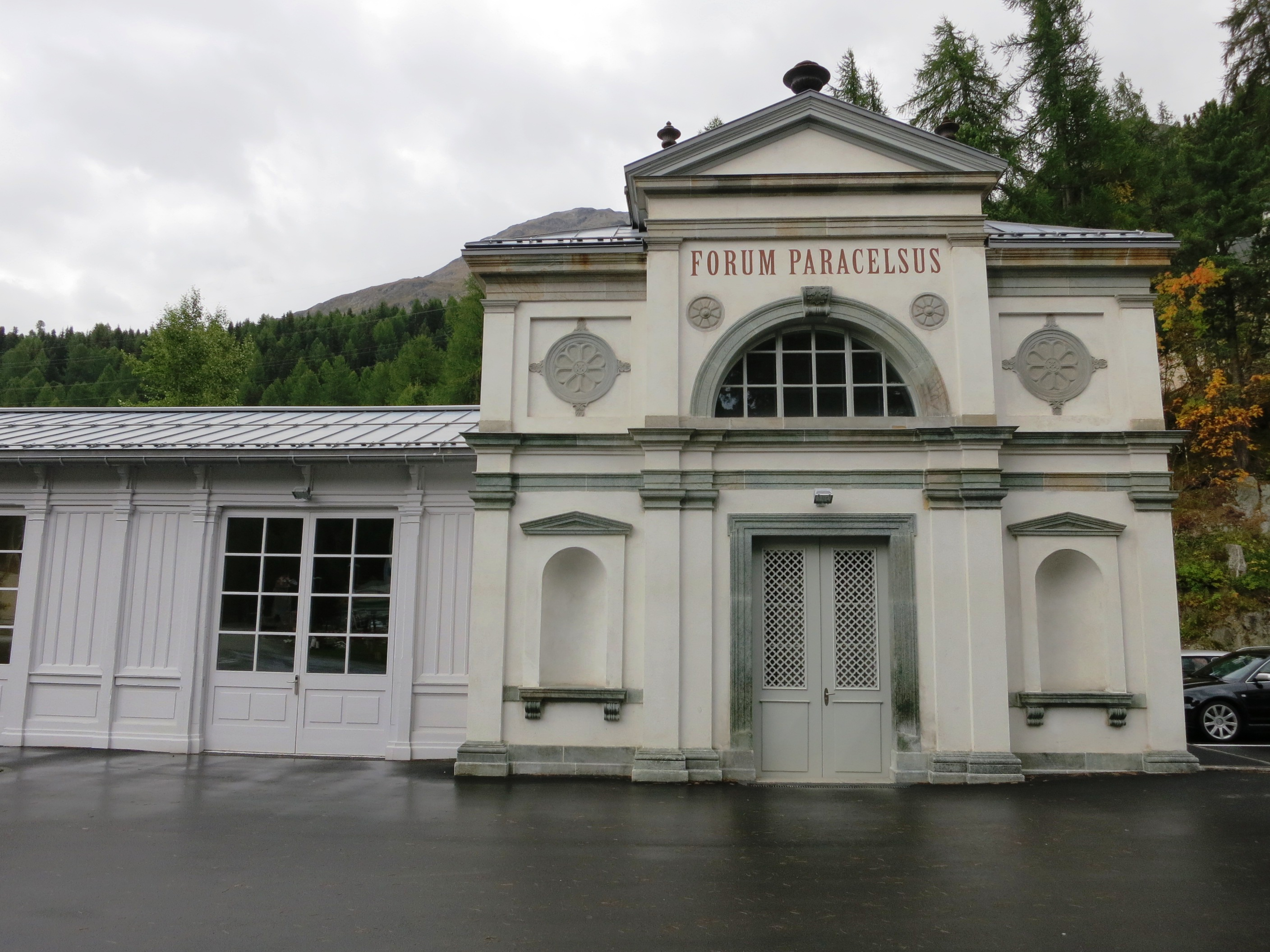 Trinkhalle, St. Moritz GR, Schweiz